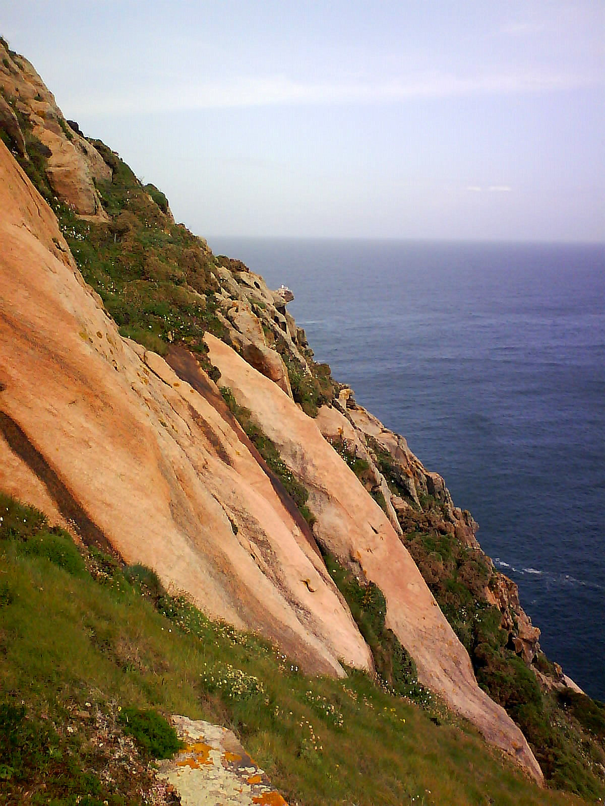 Cabo Vilán, Camariñas, Galiza